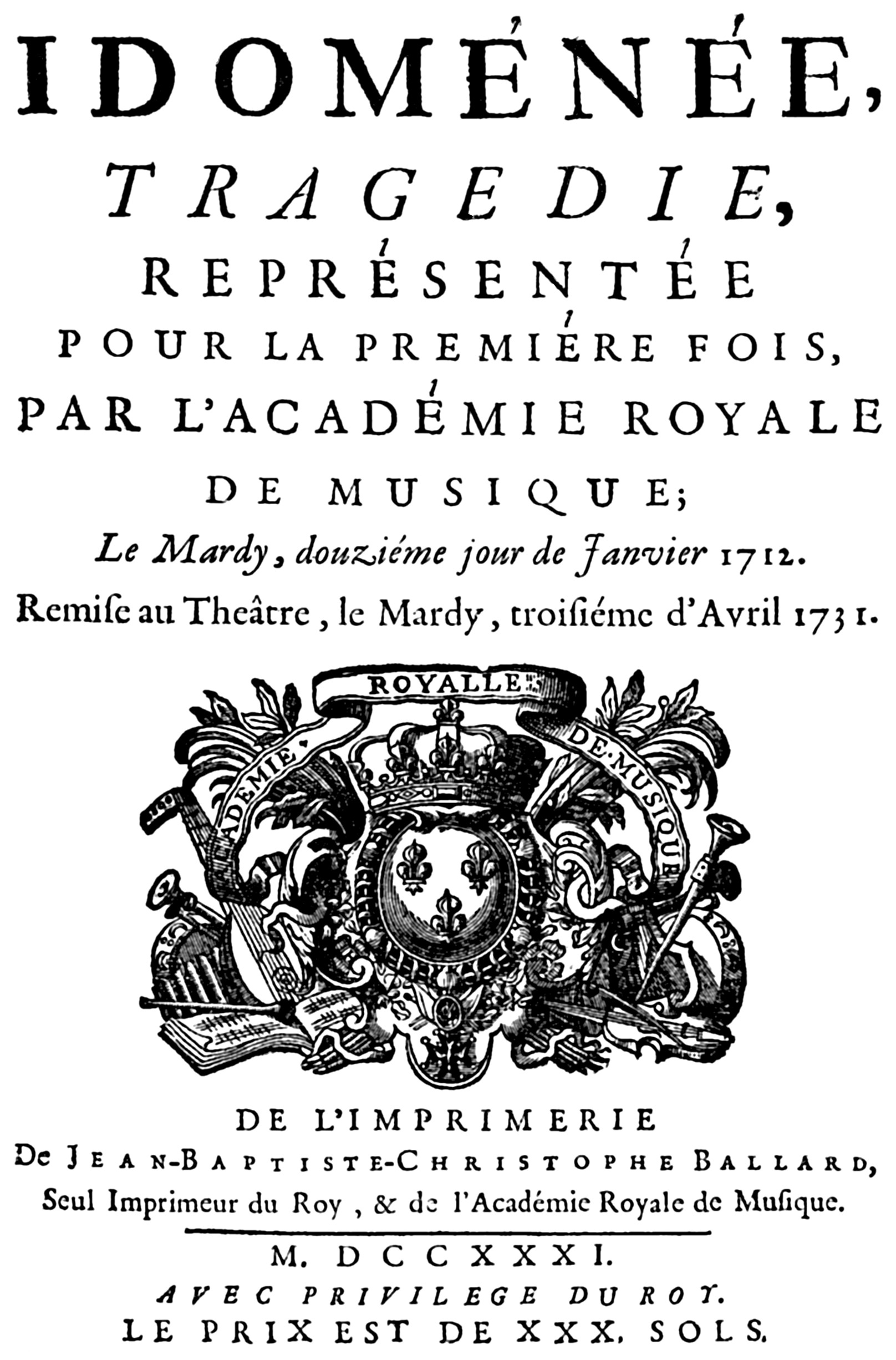 Frontispice du livret d'une reprise d'Idoménee d'André Campra